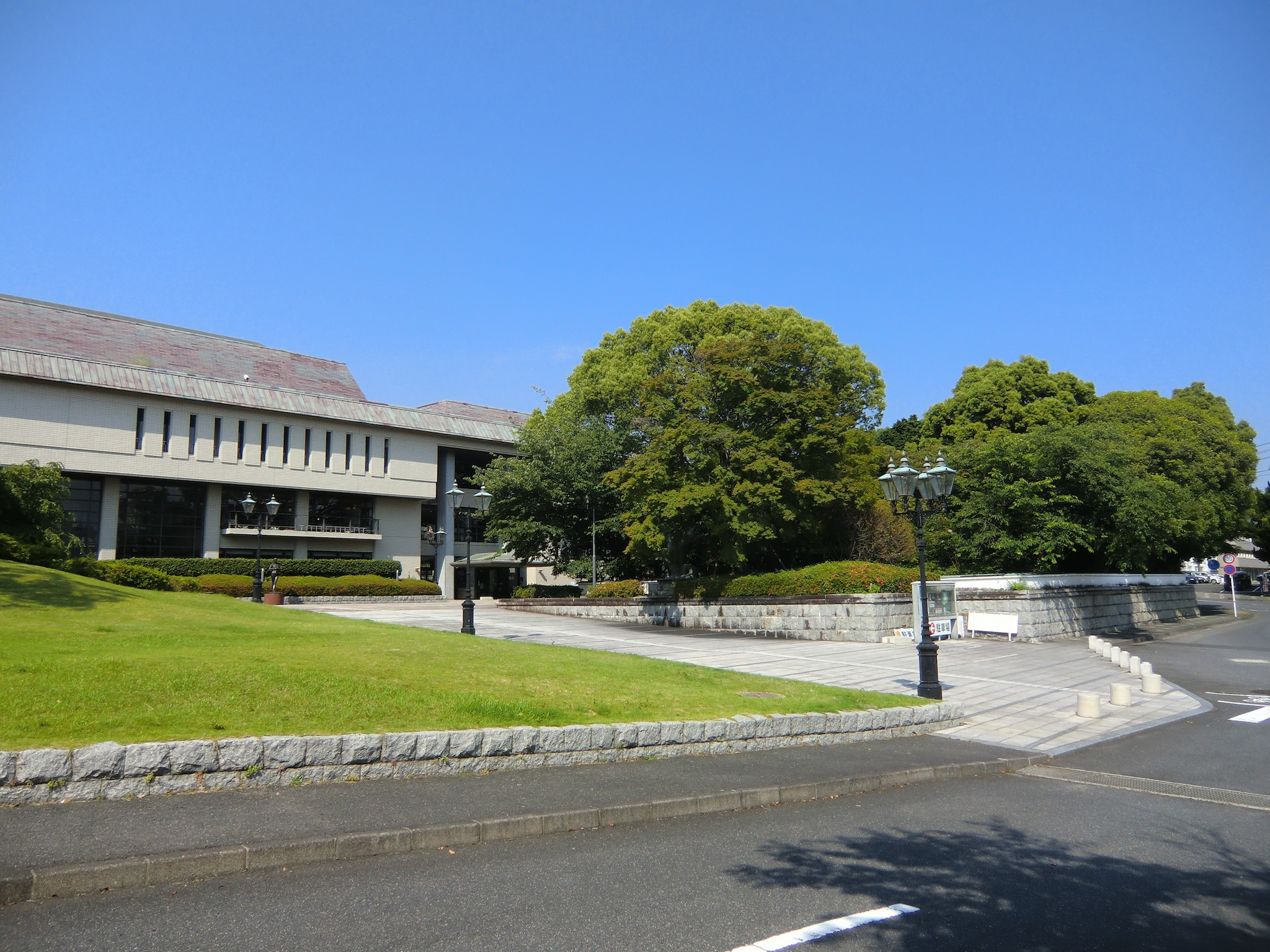 周南市文化会館の外観（山口県周南市）。旧徳山城跡地。